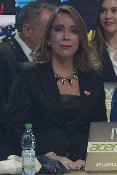 02 Diciembre 2016, Ministra Paula Narváez asiste a ceremonia de inauguración de Teleton 2016.